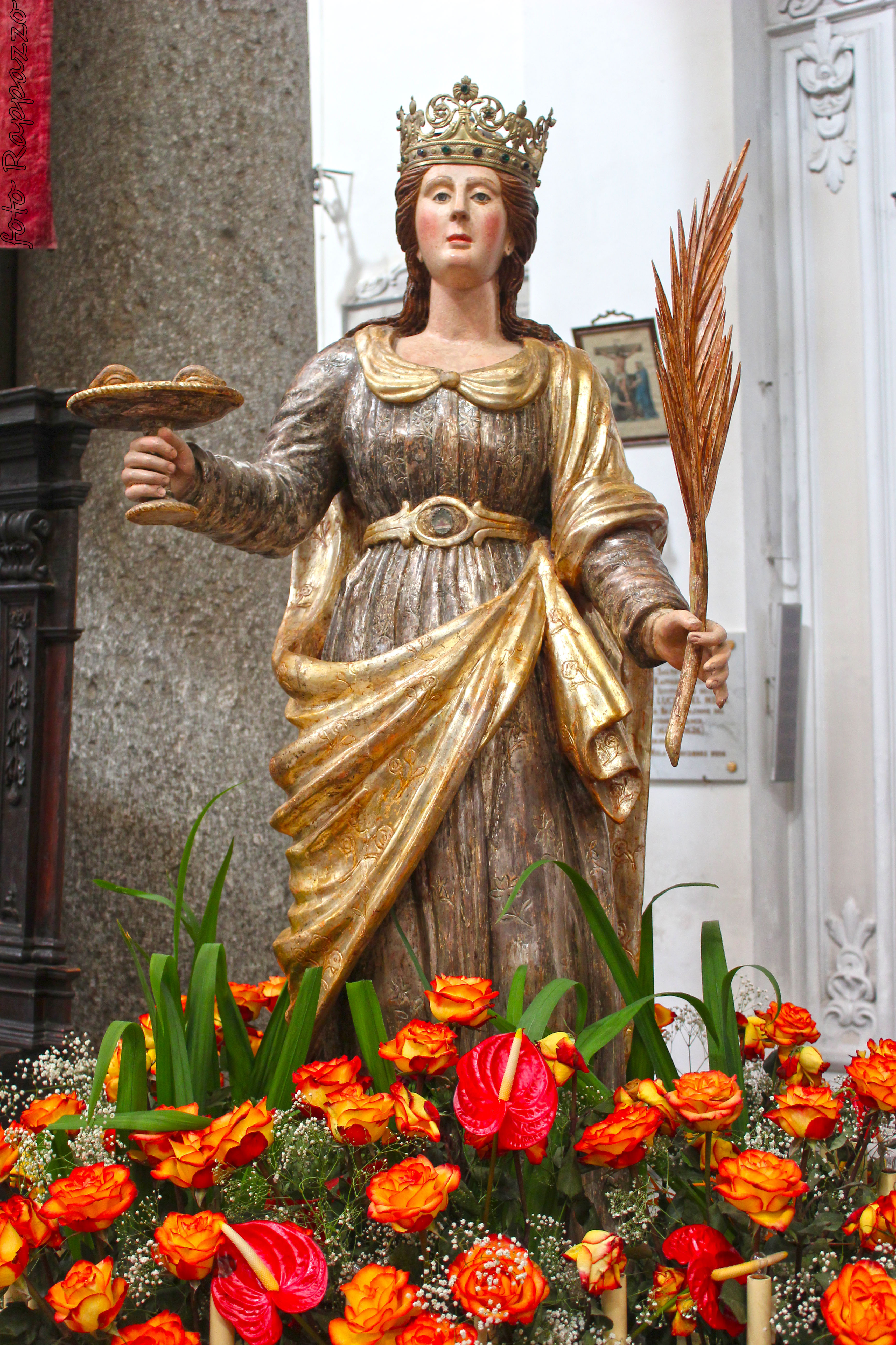 Santa Lucia, Statua lignea, Santa Lucia del Mela